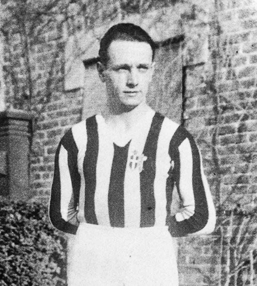 Il calciatore italiano Luigi Bertolini alla Juventus negli anni 30 del XX secolo.